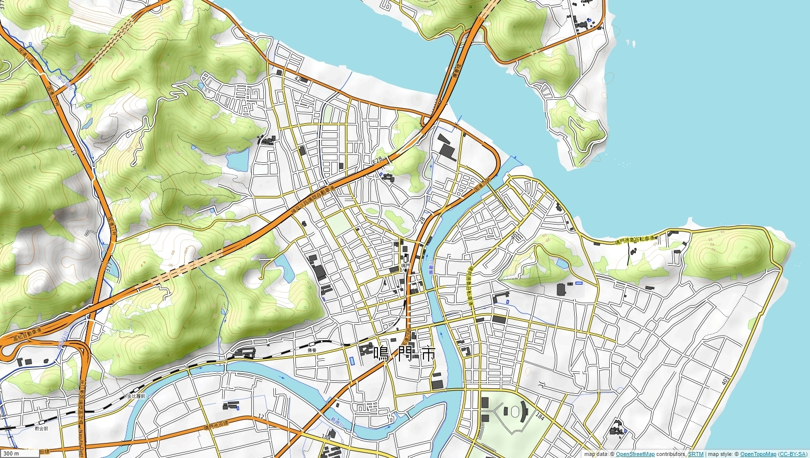 徳島県鳴門市撫養川河口周辺地図